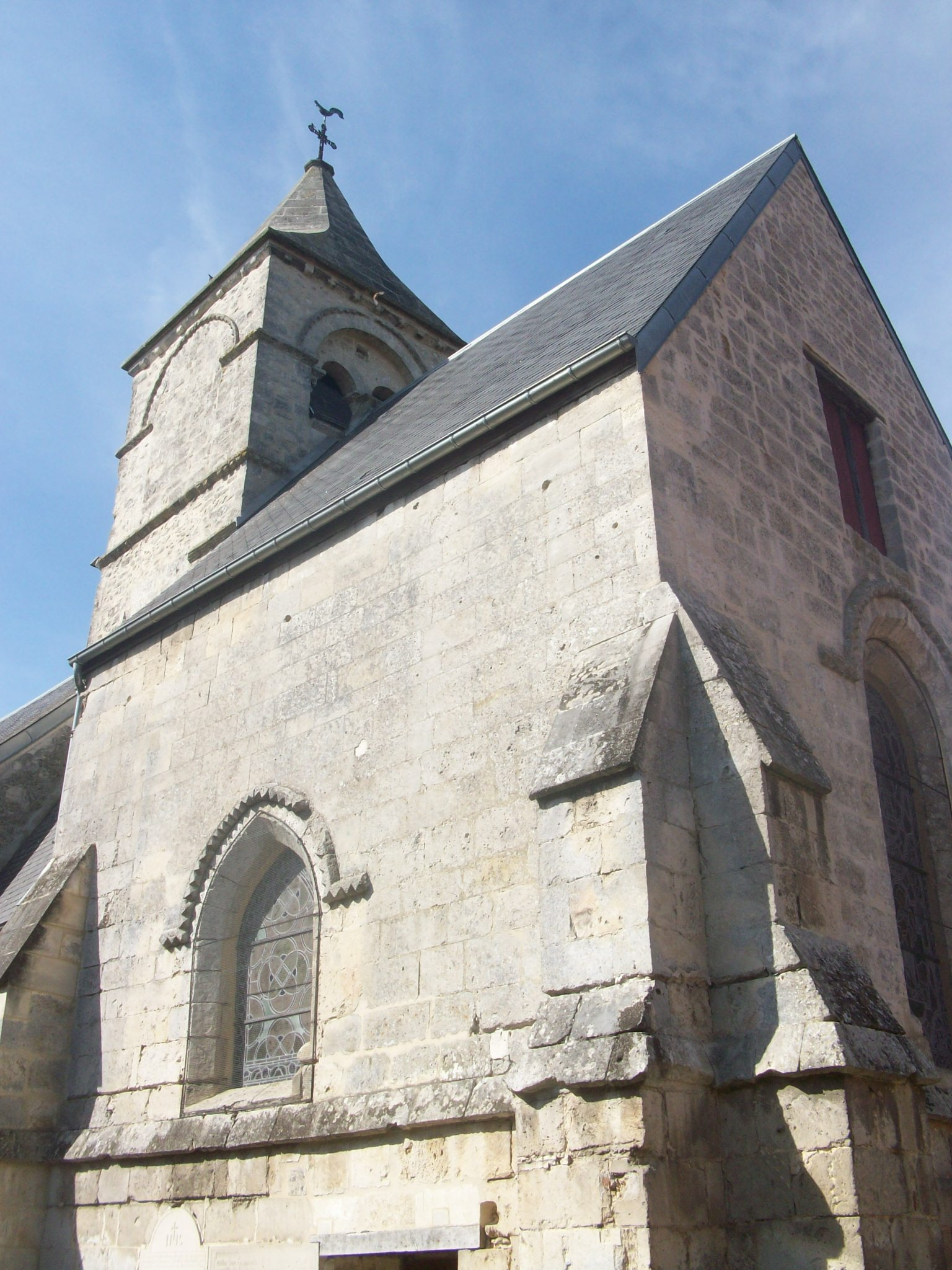 Vue extérieure de la chapelle St-Jacques d'Auvillers.